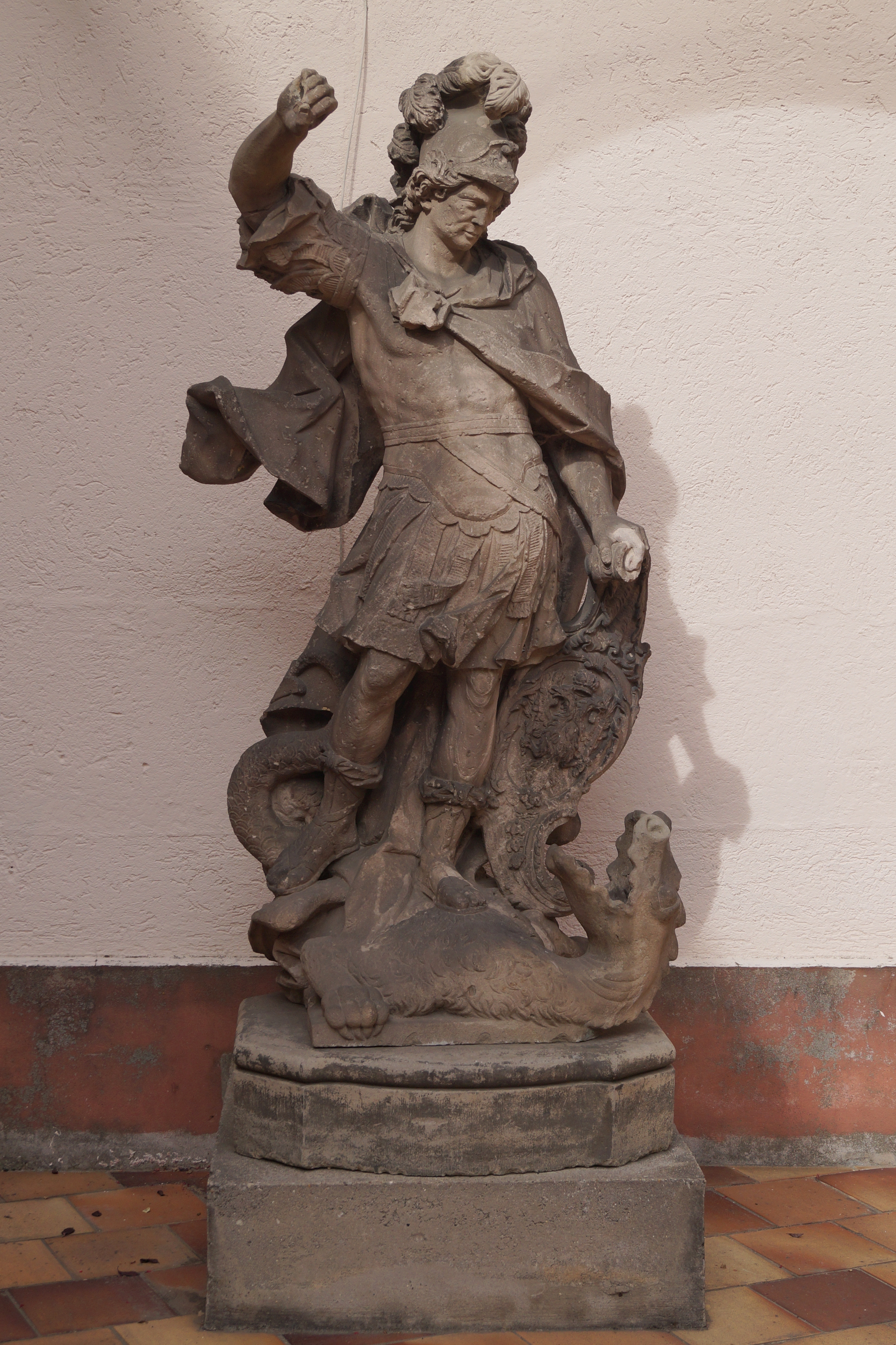 Original der Drachentöter-Statue vom St. Georgsbrunnen aus der Burg Friedberg, heute ausgestellt im Hof des Wetterau-Museums, Friedberg, Hessen.